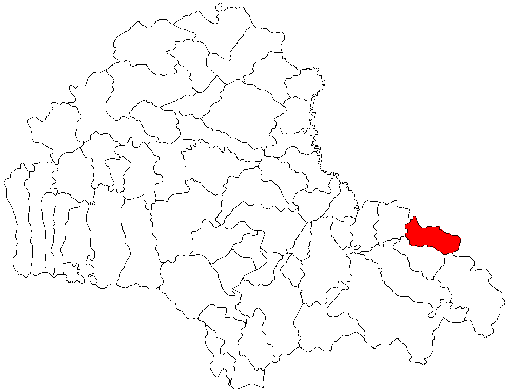 Categorie:Hărţi ale judeţului Braşov